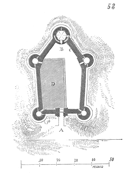 ... La célèbre tour de Montlhéry, sur l'ancienne route de Paris à Orléans, est à la fois réduit du donjon et guette. Ce qu'on désigne aujourd'hui sous le nom de château de Montlhéry n'est, à proprement parler, que le donjon, situé au point culminant de la motte. Le château consistait en plusieurs enceintes disposées en terrasses les unes au-dessus des autres, et renfermant des bâtiments dont on découvre à peine aujourd'hui les traces. Chacune de ces terrasses avait plus de cent pieds de longueur, et c'était après les avoir successivement franchies qu'on arrivait au donjon ayant la forme d'un pentagone allongé (fig. 58). Lorsqu'on avait gravi les terrasses, on se trouvait devant l'entrée A du donjon, dont la construction appartient à la première moitié du XIIIe siècle ...